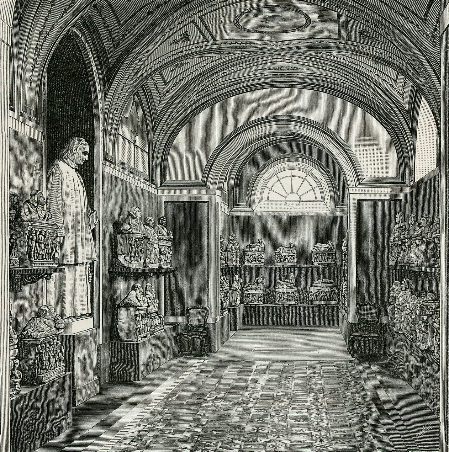 Volterra (Museo Etrusco Guarnacci): interno d’una galleria con la statua di monsignor Mario Guarnacci (xilografia di Giuseppe Barberis).